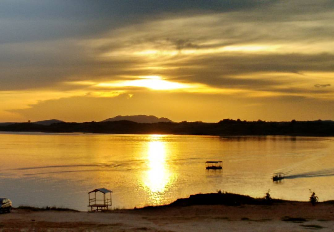 Pôr do sol visto no Açude de Orós